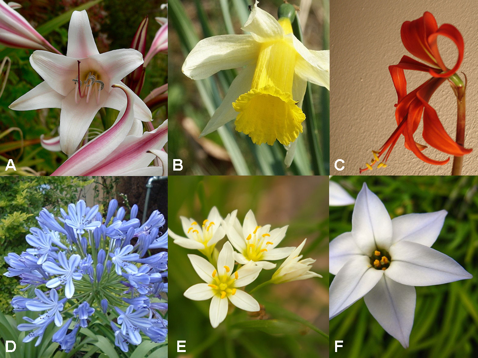 Diversidad floral en representantes de las amarilidáceas. A: Crinum, B: Narcissus, C: Sprekelia, D: Agapanthus, E: Allium, F: Tristagma. (Según Clasificación de las Amarilidáceas de Chase et al. 2009).